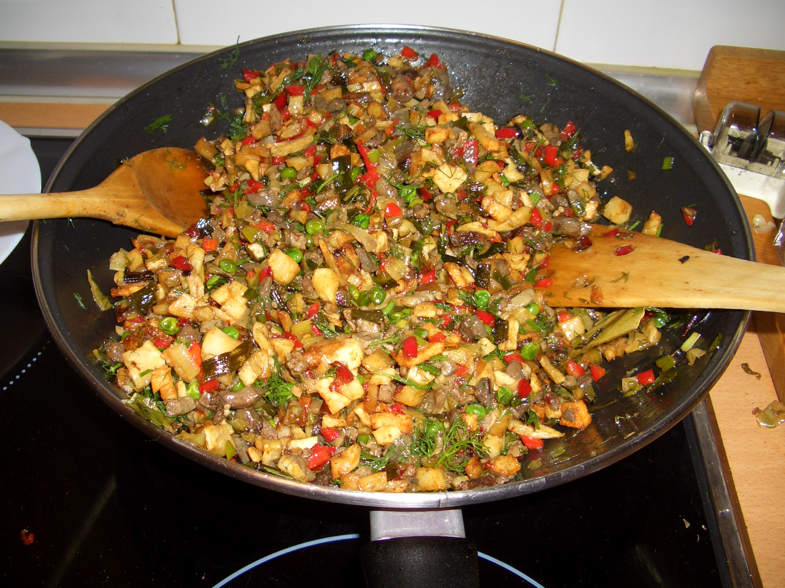 Frit mallorquí